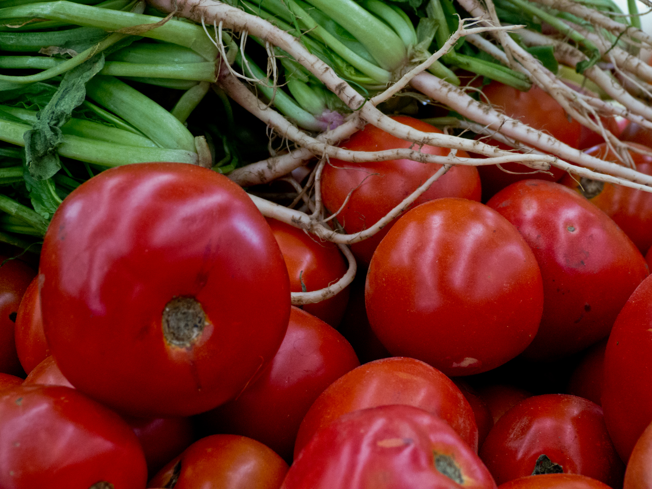 Tomates, Plaza de Mercado "El Cacique de Chía" - Colombia Tomates, Plaza de Mercado "El Cacique de Chía" - Colombia